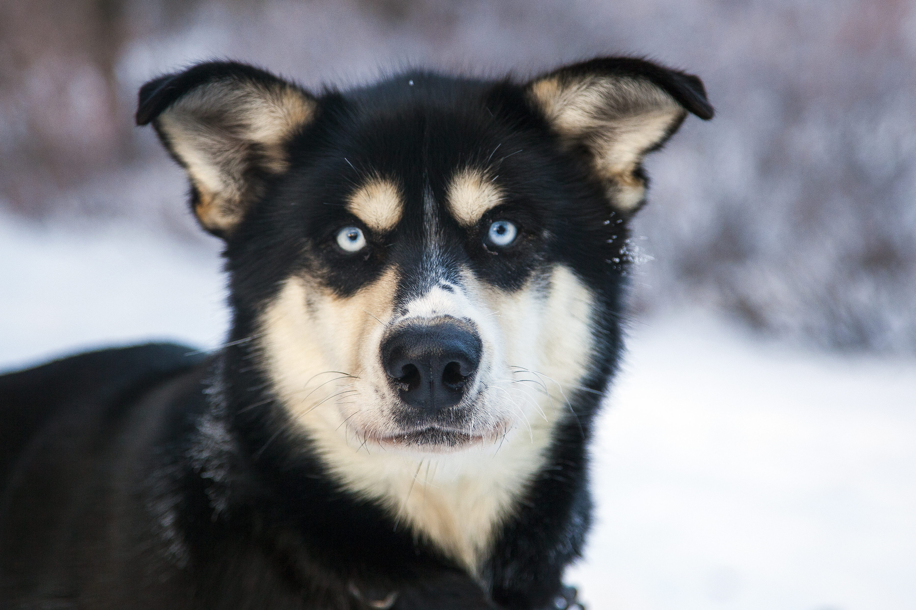 NPS Photo / Daniel A. Leifheit